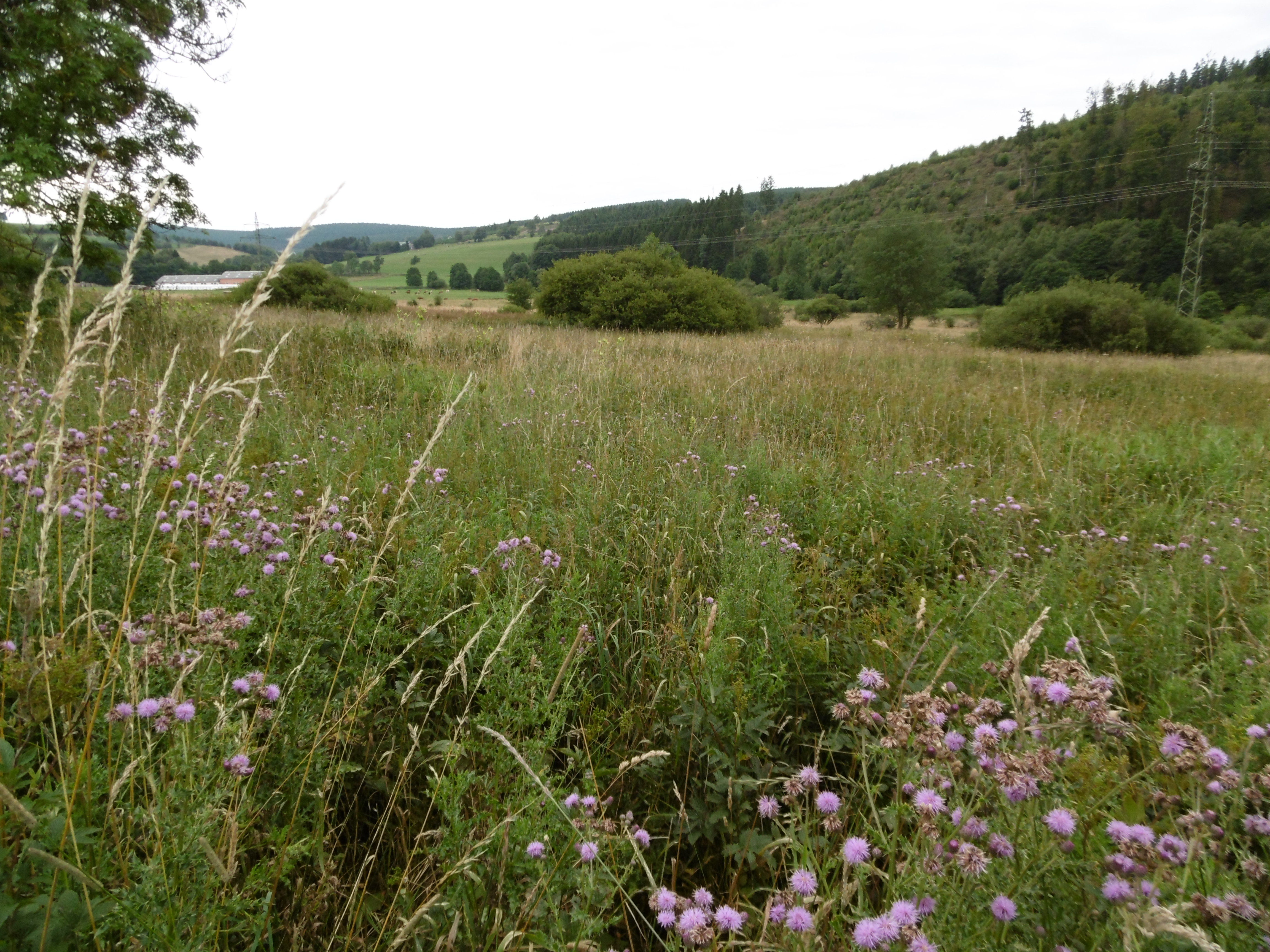 Naturschutzgebiet Irrgeister Richtung Ost gesehen vom Nordrand der NRW-Stiftungsfläche.